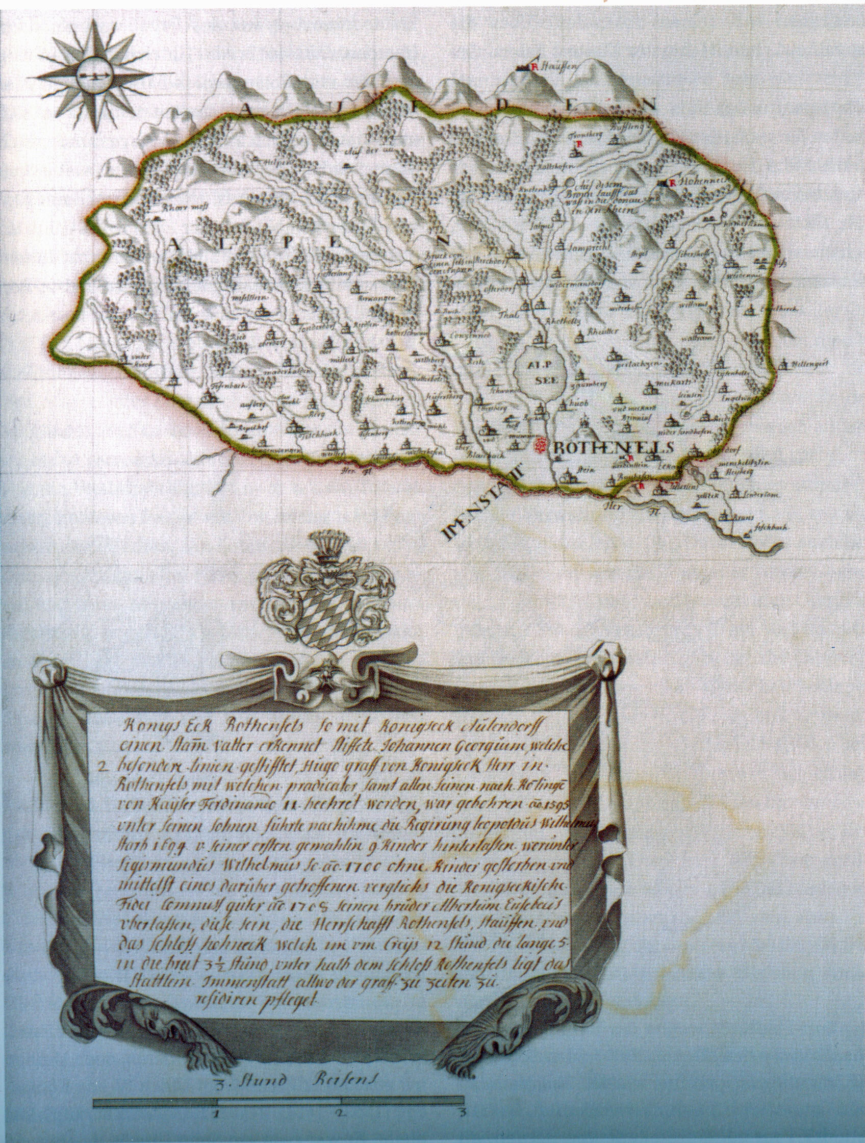 Die Grafschaft Rothenfels Kollorierte Zeichnung